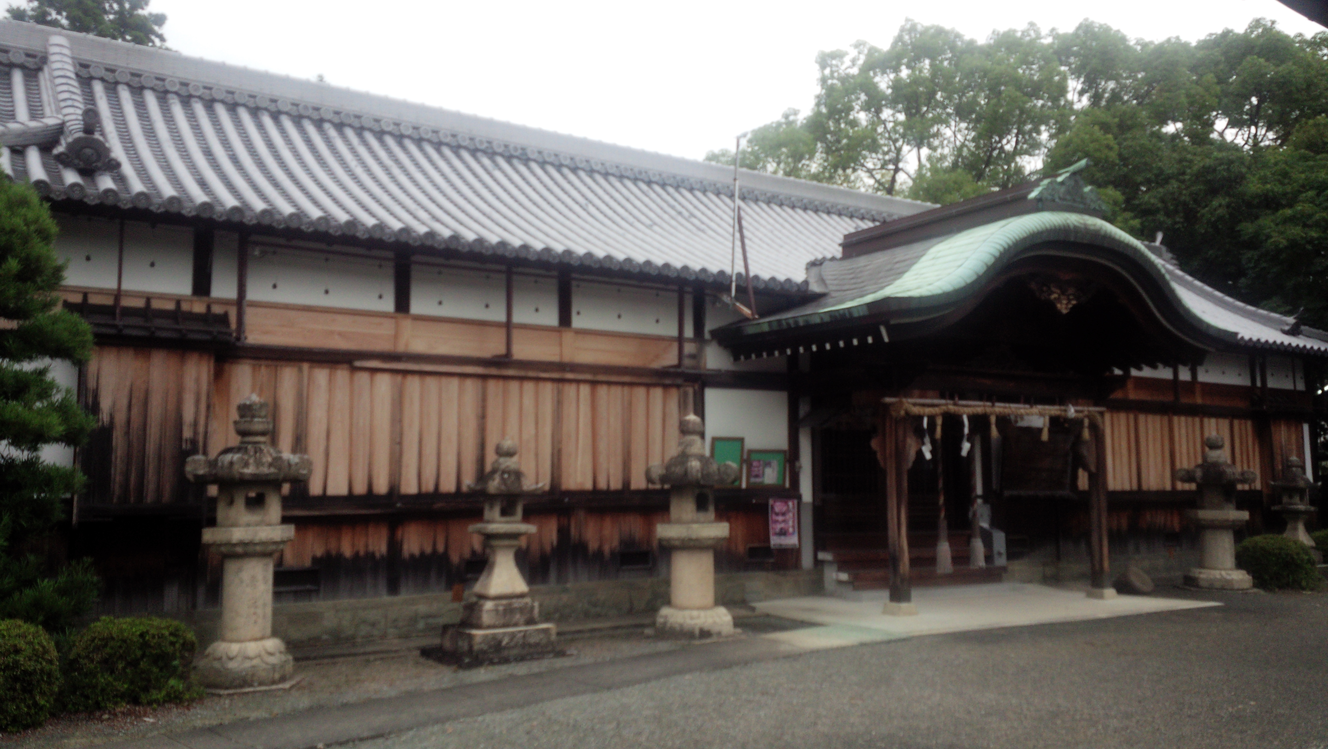 蟻通神社 (泉佐野市) の拝殿